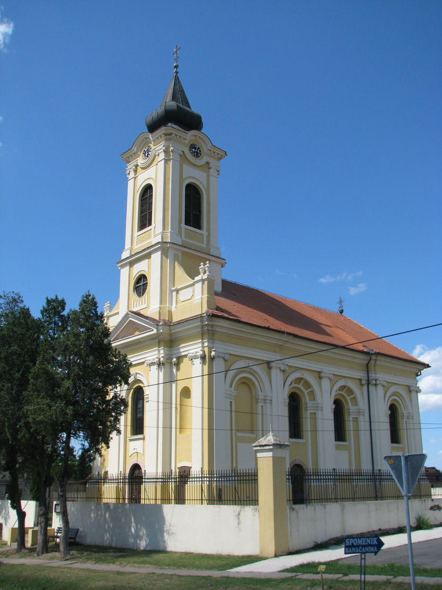 црква у Сурдуку }